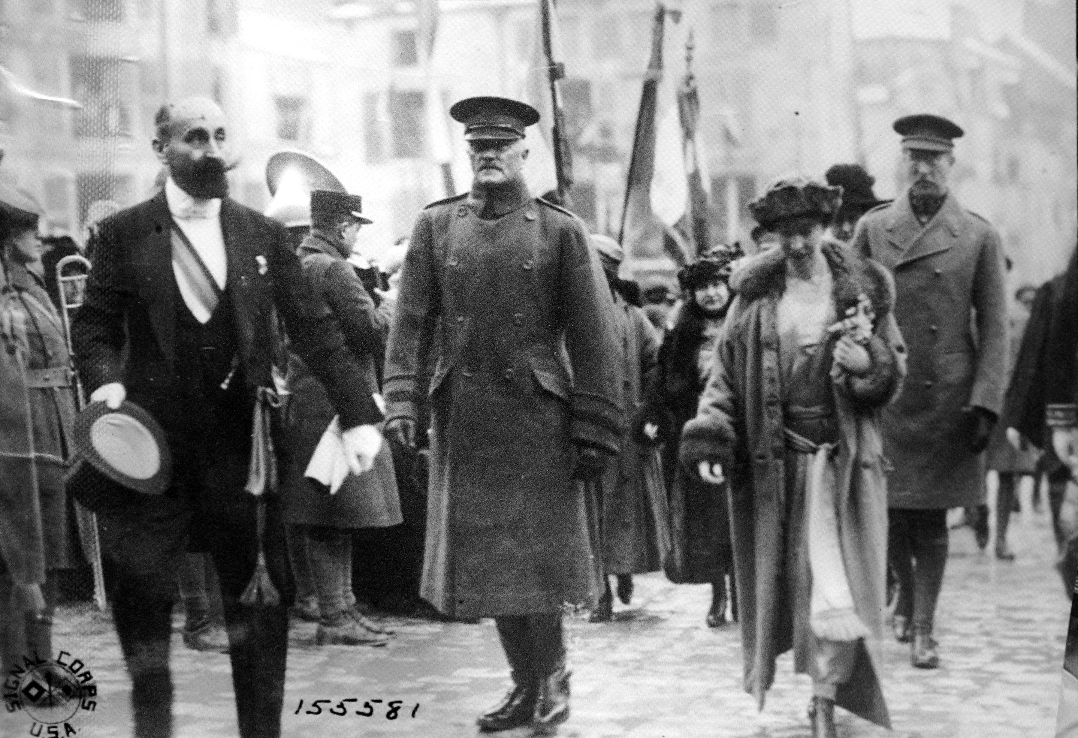 image du fonds des archives départementales.